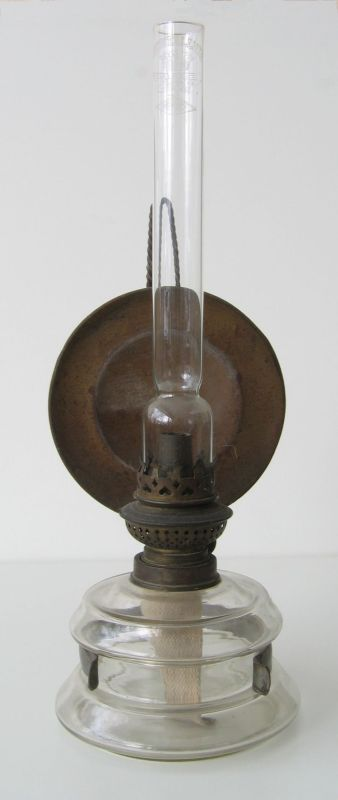 Petroleumlampe aus Frankreich mit Kosmosbrenner, Ende 19. Jahrhundert